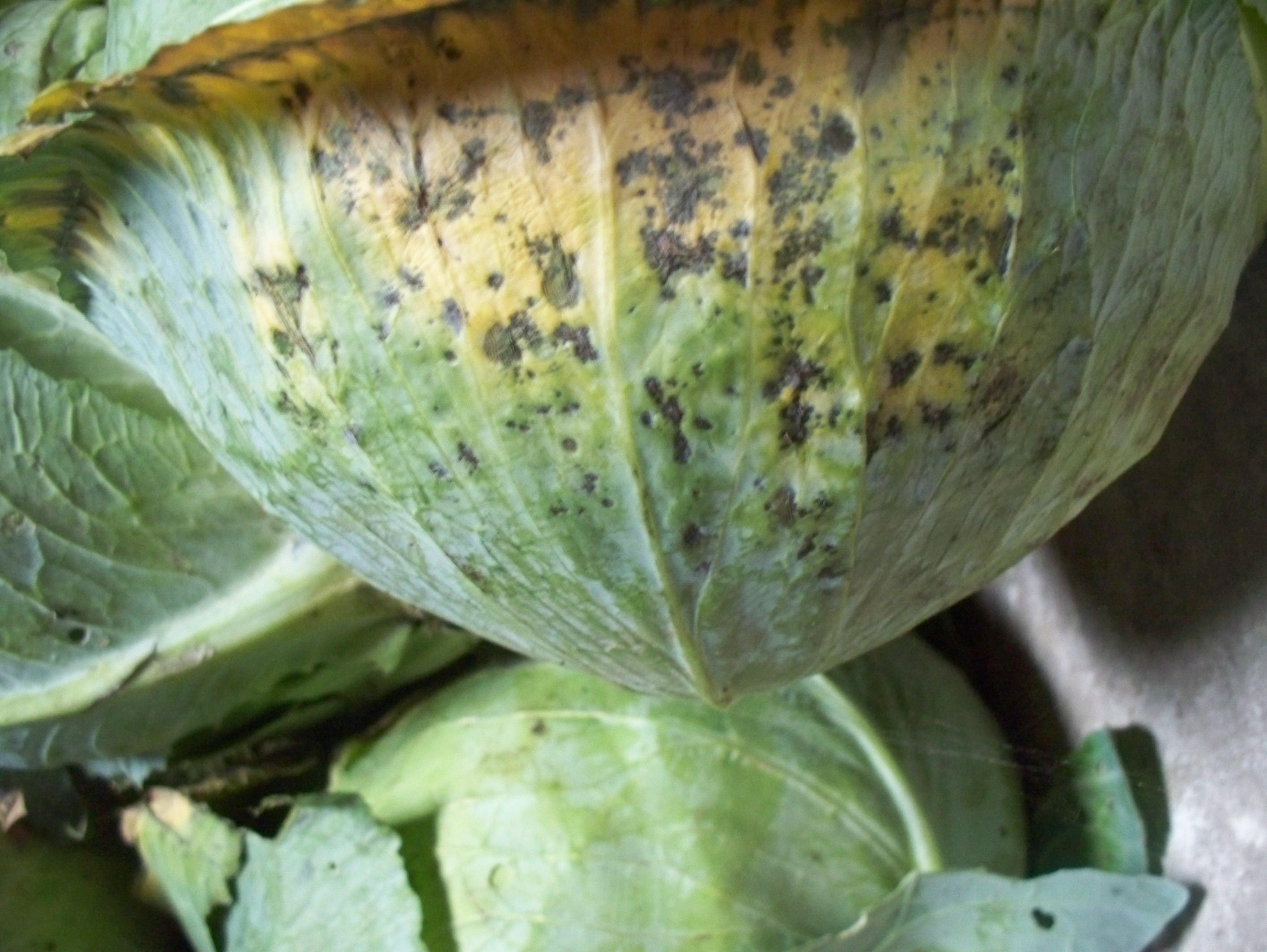 czerń krzyżowych na kapuście